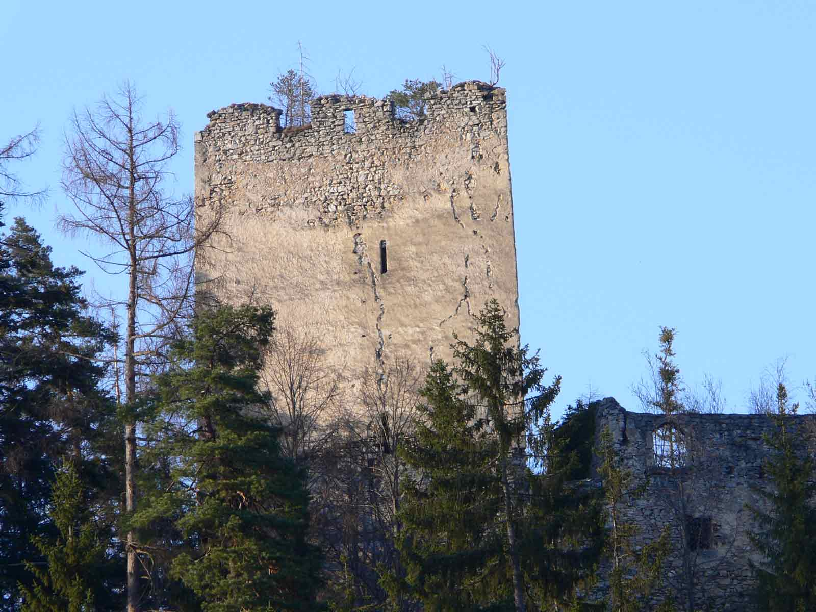 Burgruine Waldstein, Gemeinde Deutschfeistritz